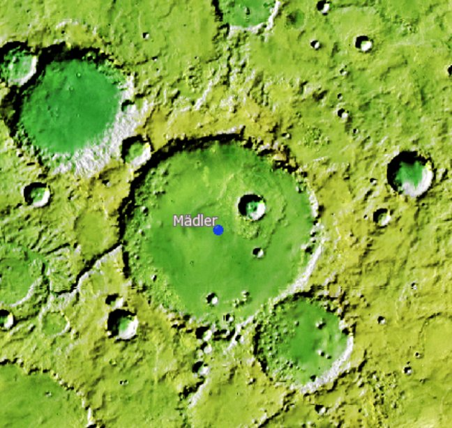 Cráter marciano Mädler.(Imagen IAU/USGS/Goddard/A SU/USGS)